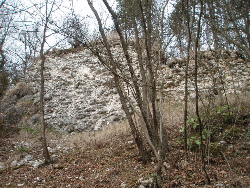 Ruins of Krško Castle (Slovenia)